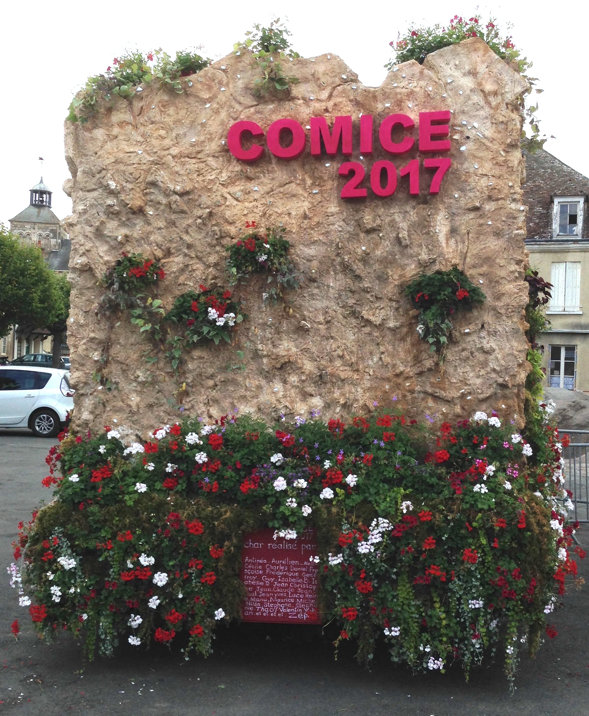 Comice agricole 2017 - char des reines